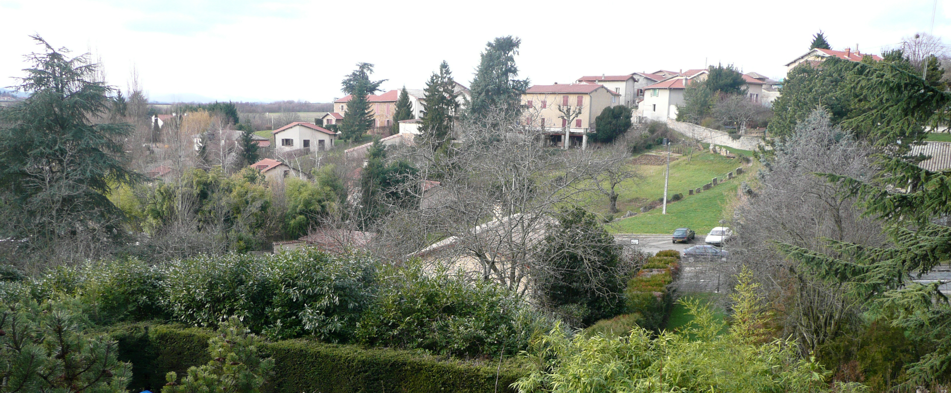 Dardilly (Département Rhône)